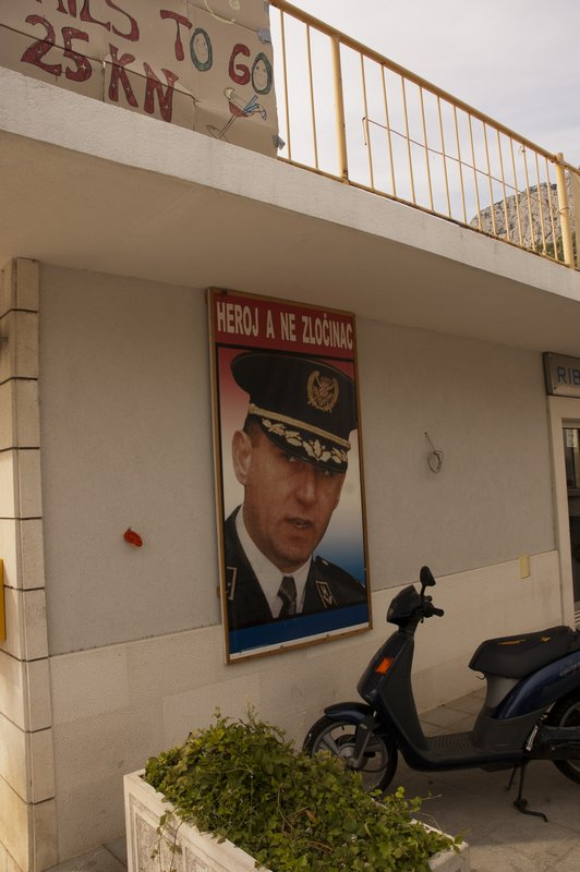 Plakat "Bohater, a nie przestępca" przy deptaku w miejscowosci Baska Voda. Wrzesień 2011r.